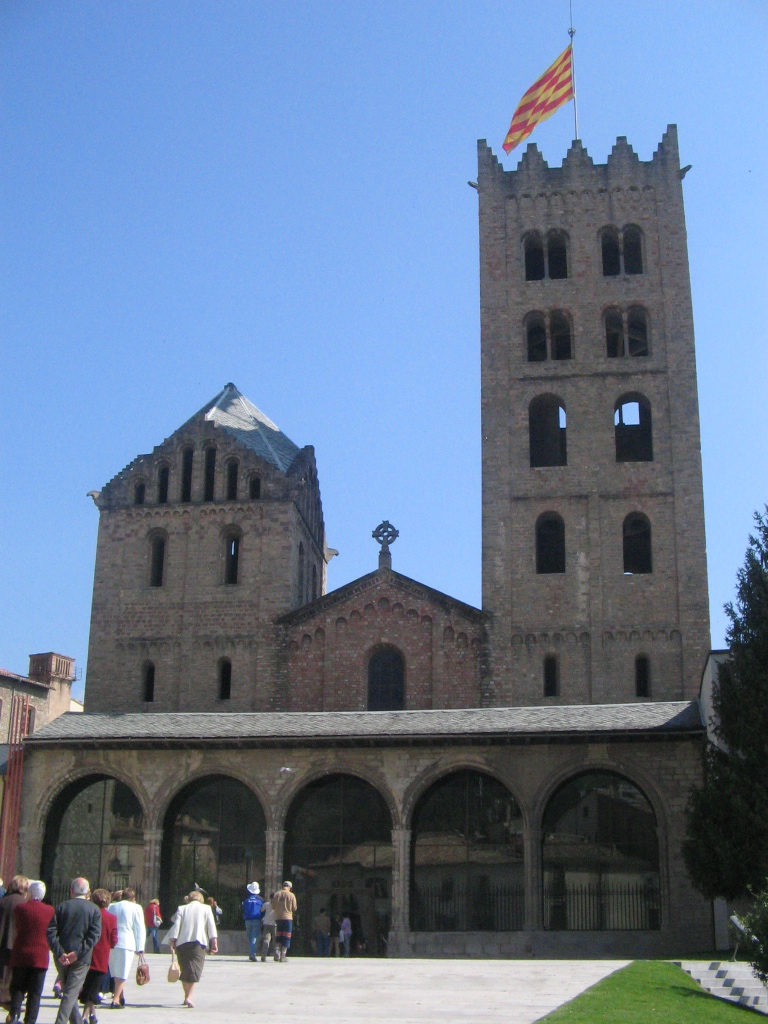 Monasterio de Ripoll, España